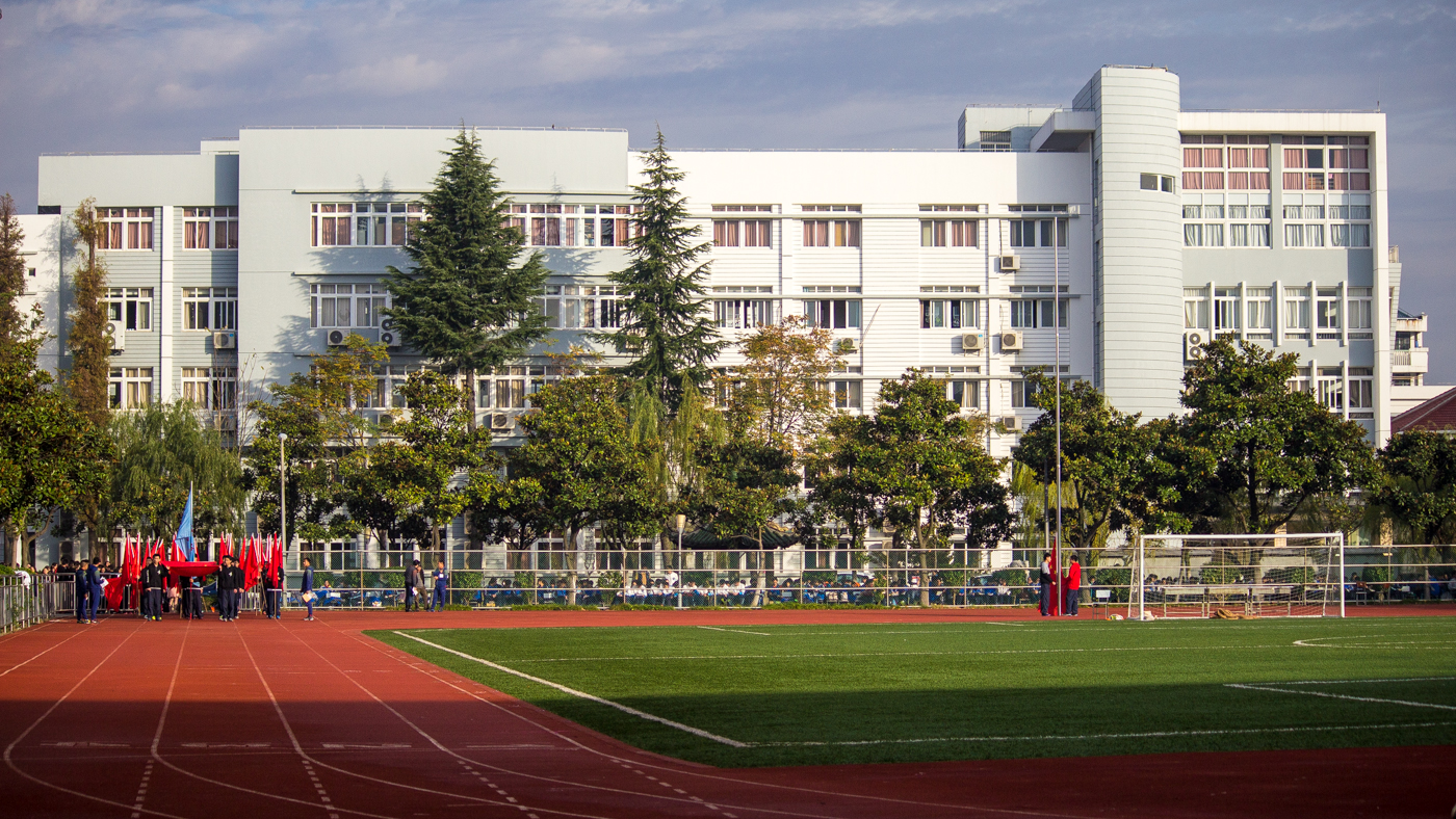 中文（中国大陆）: 2014年11月17日摄于川沙中学